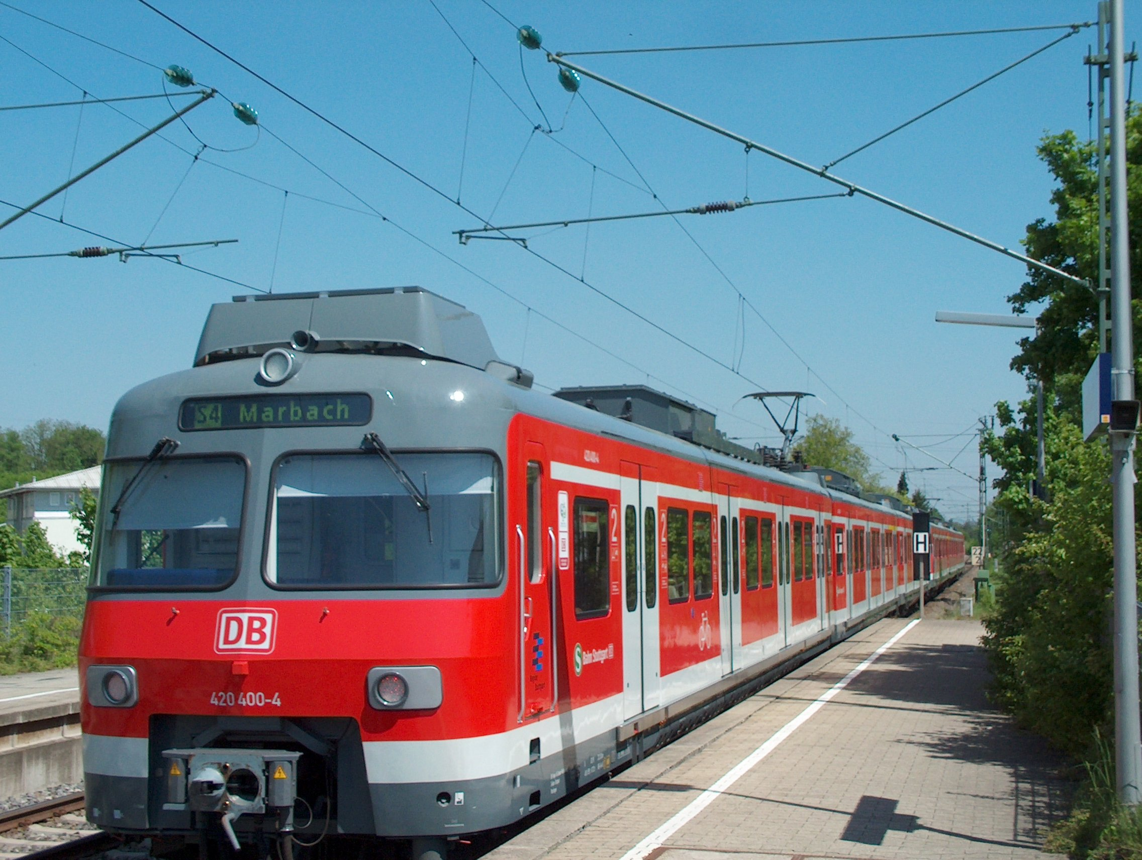 S-Bahn-Zug der DB Baureihe 420, überarbeitet, der S-Bahn Stuttgart